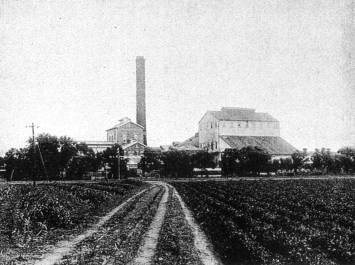 明治製糖總爺製糖所